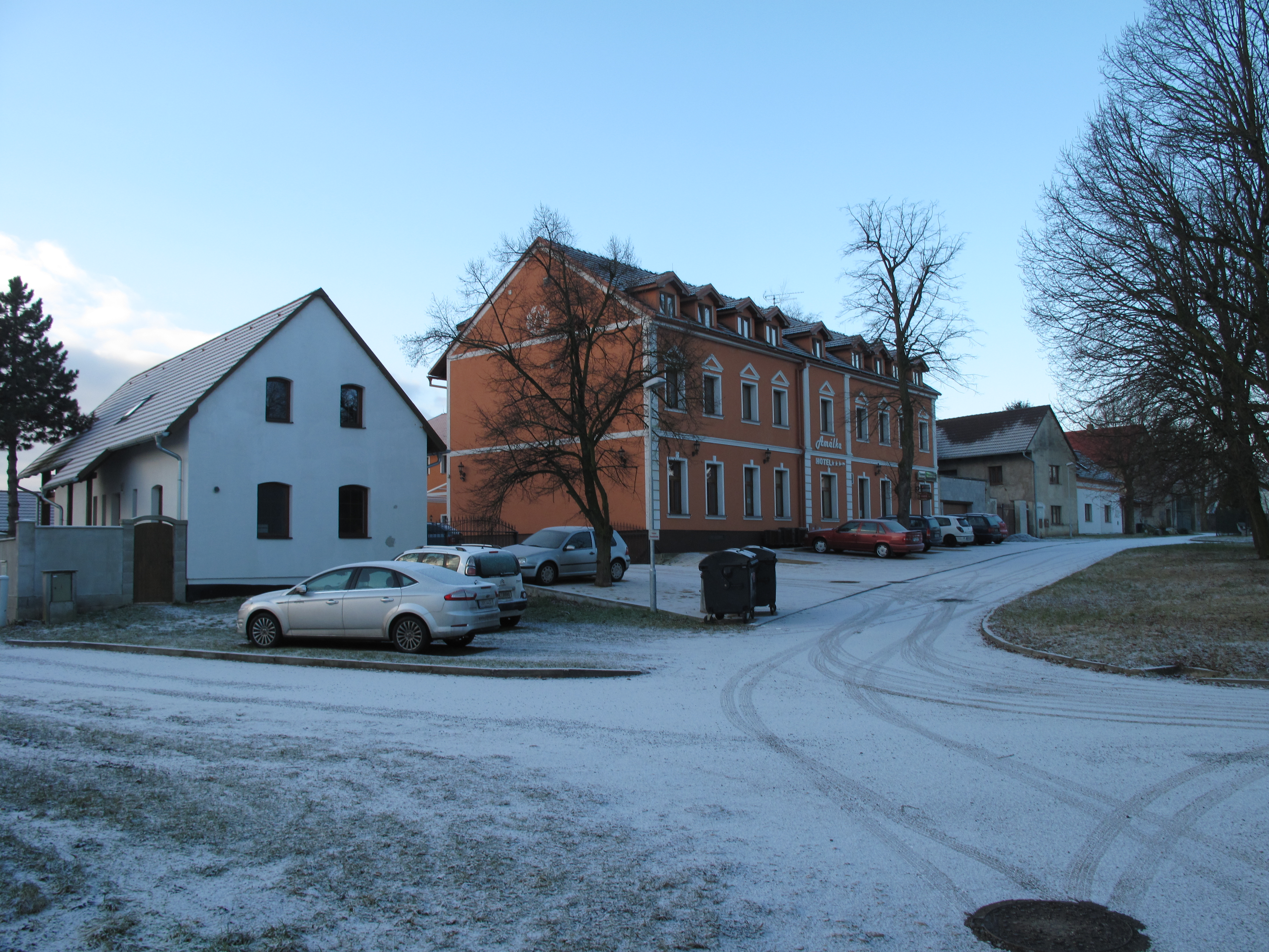 Hospoda ve Vodochodech. Okres Litoměřice, Česká republika.